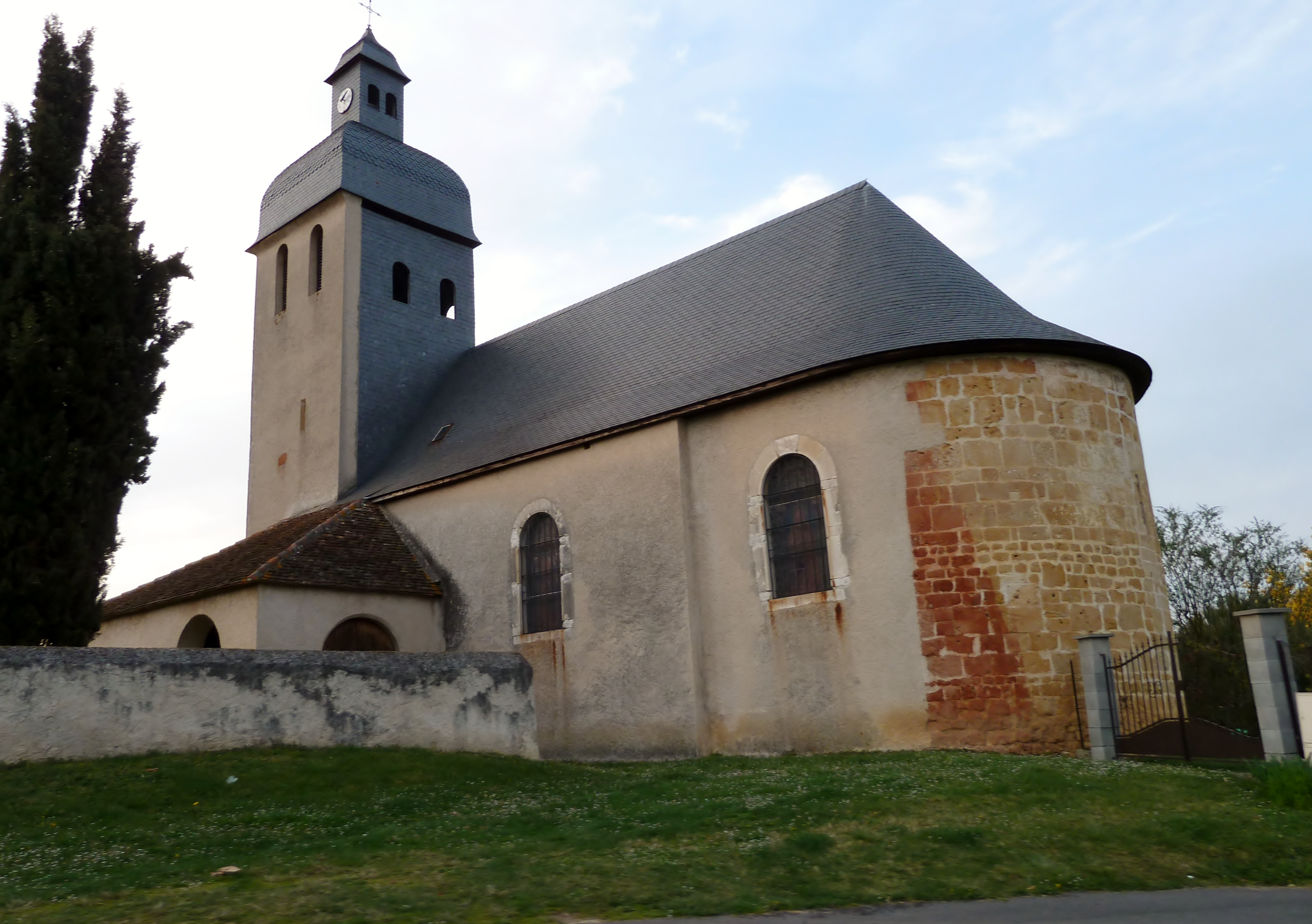 Église d'Argelos (Pyrénées-Atlantiques)